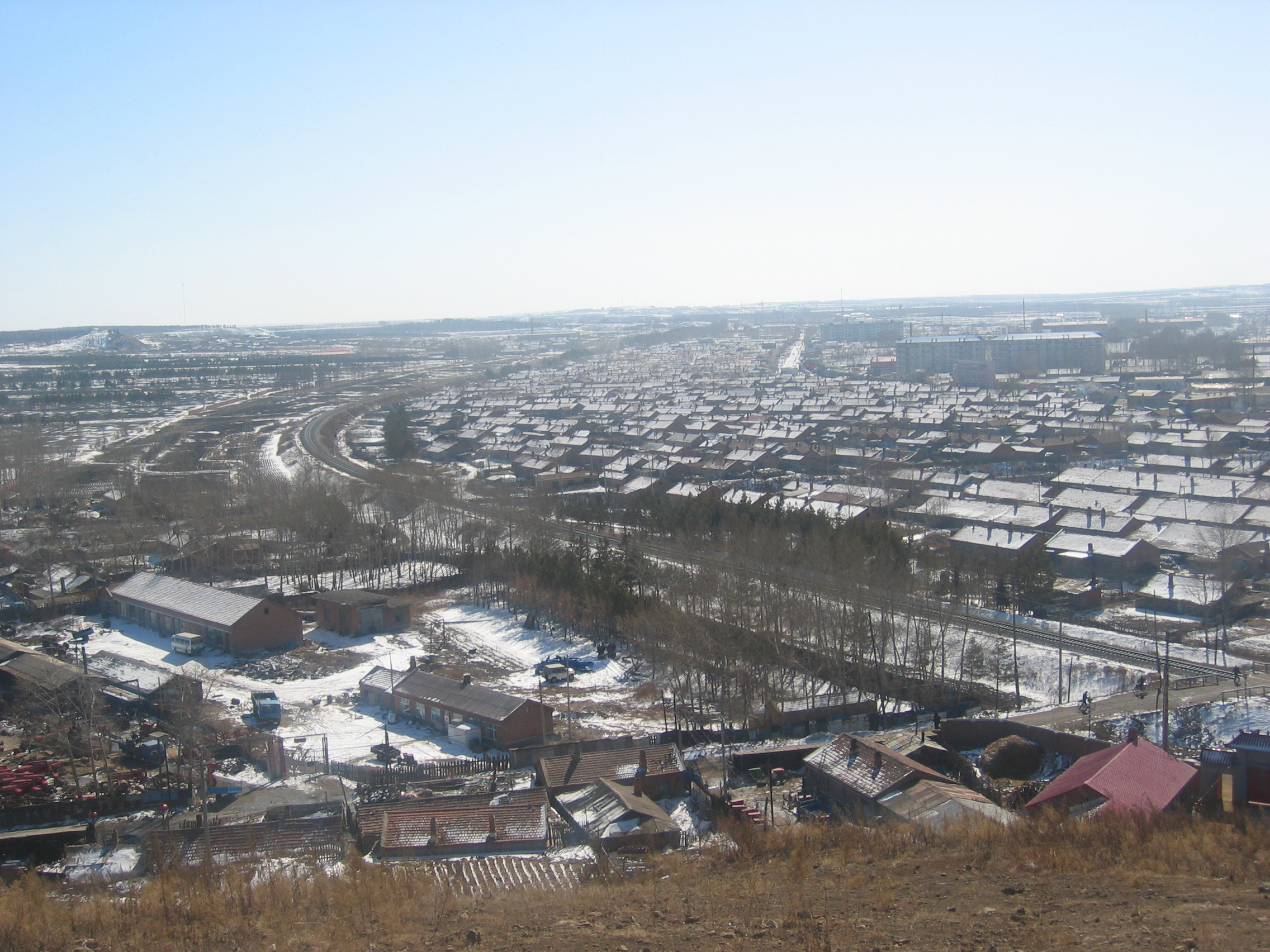 远看大杨树全景 QQ696847